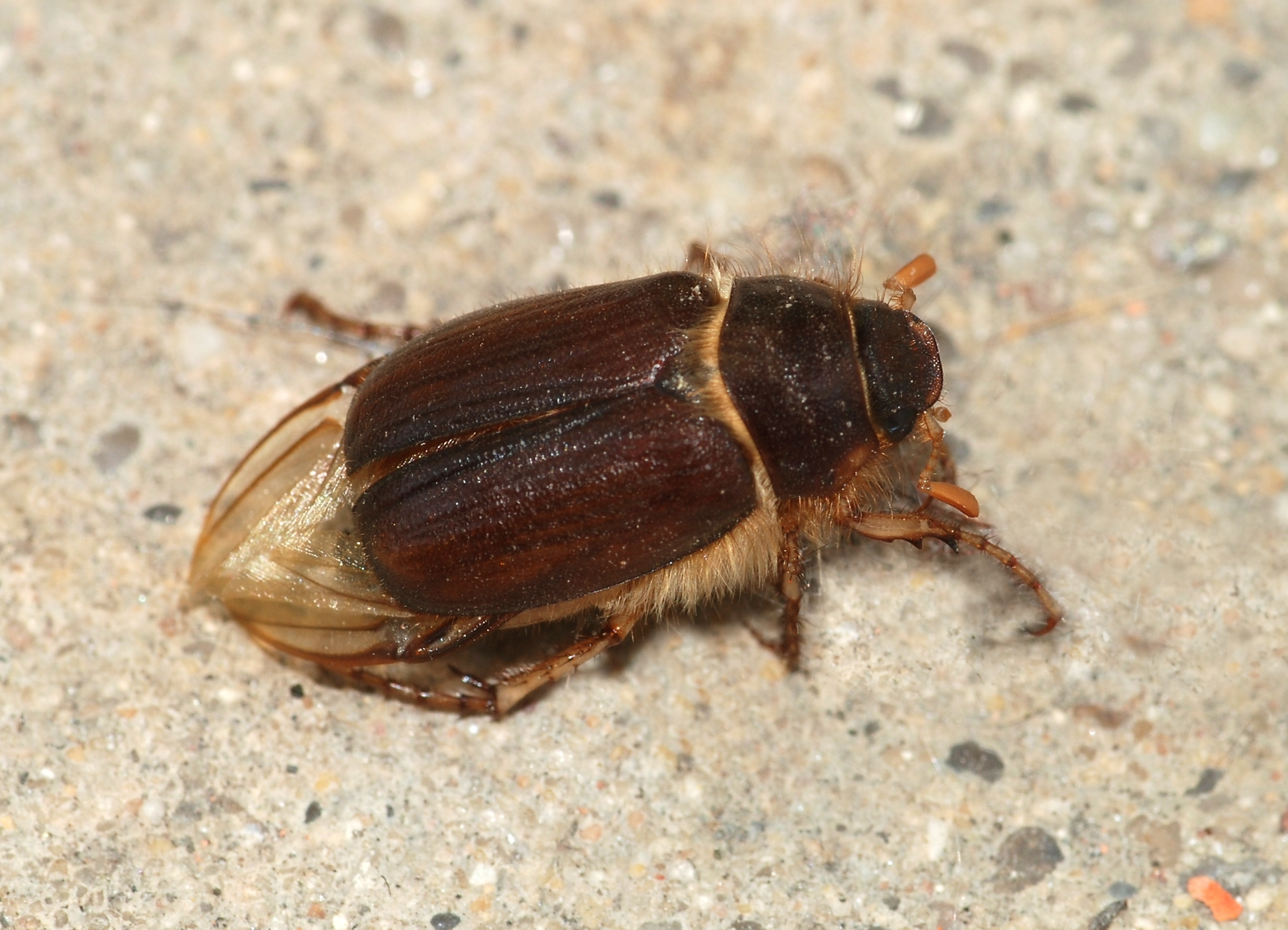 A Rhizotrogus aestivus beetle